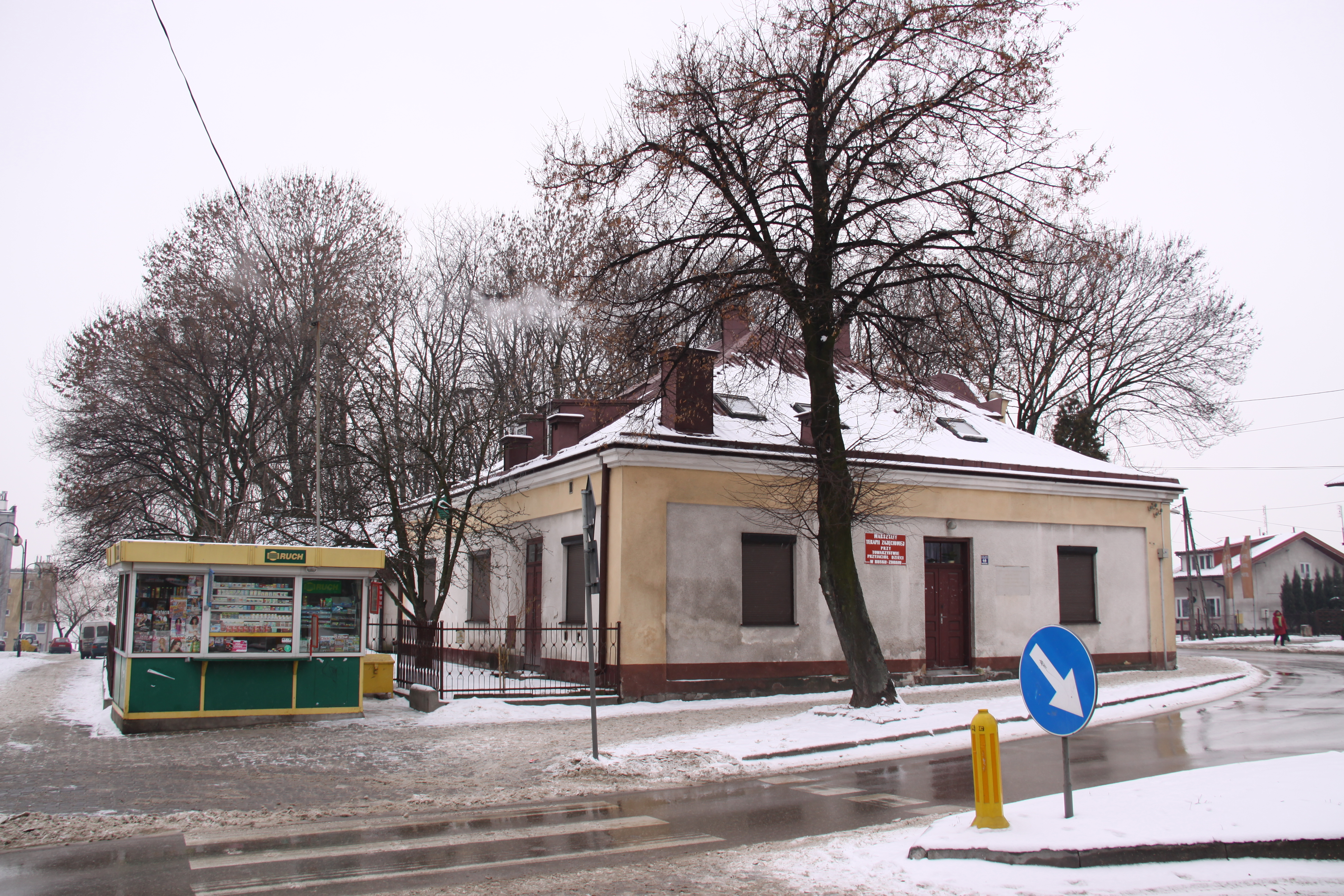 Busko-Zdrój, ul. Kosciuszki 49 - budynek wybudowany w 1931 r. jako Schronisko dla starców i kalek, fundacji Józefy Majewskiej. Obecnie mieszczą się w nim warsztaty zajęciowe Miejskiego Ośrodka Pomocy Społecznej.